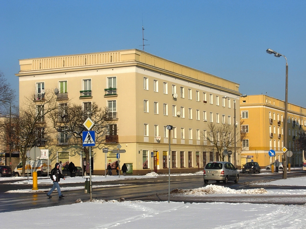 Zabudowa przy ul. Sułkowskiego na osiedlu Leśnym w Bydgoszczy